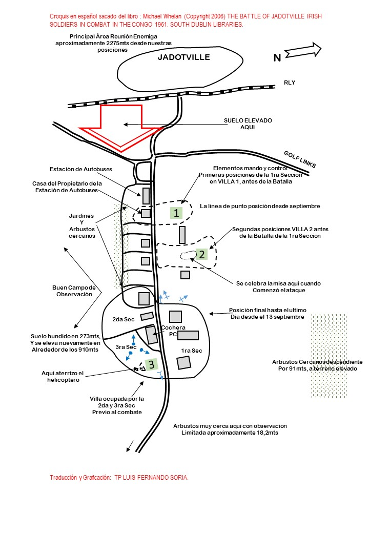 Michael Whelan (Copyright 2006) THE BATTLE OF JADOTVILLE IRISH SOLDIERS IN COMBAT IN THE CONGO 1961. SOUTH DUBLIN LIBRARIES